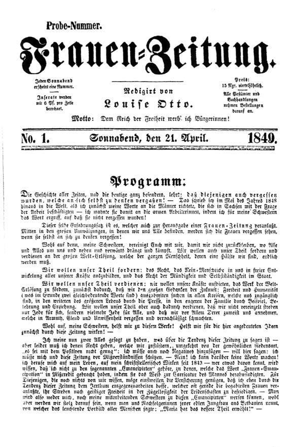 Titelseite der Probenummer von Louise Ottos "Frauen-Zeitung"